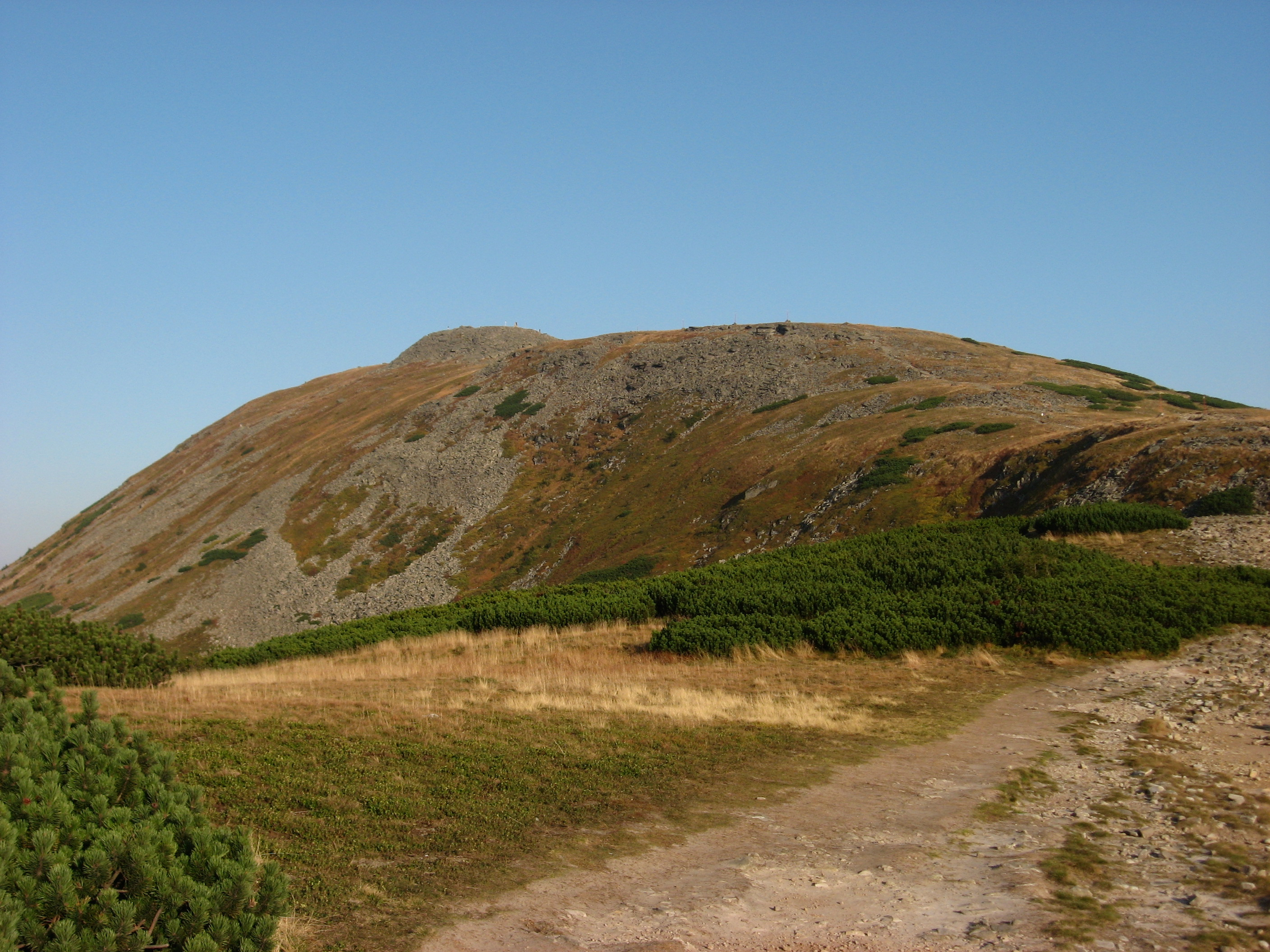 Górne partie Babiej Góry